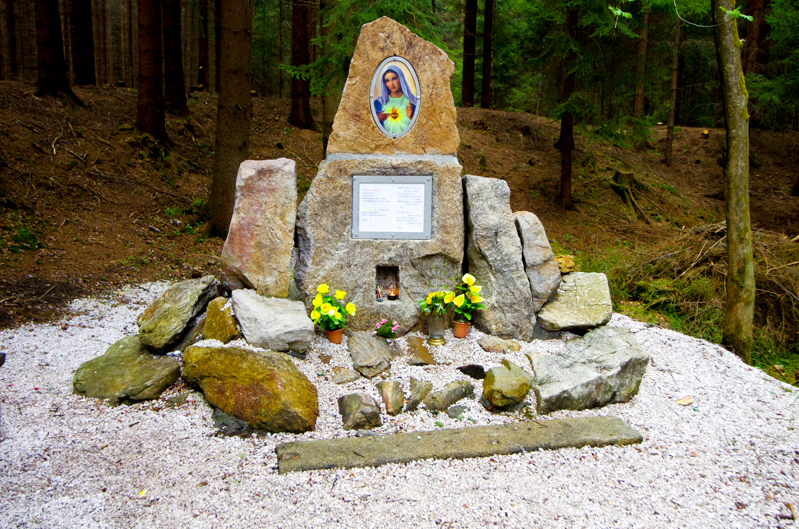 Lesní pobožnost v místě "U tří pramenů" ve Slavkovském lese, v lese SZ od Horního Slavkova, v místě tří pramenů Stříbrného potoka, okres Sokolov